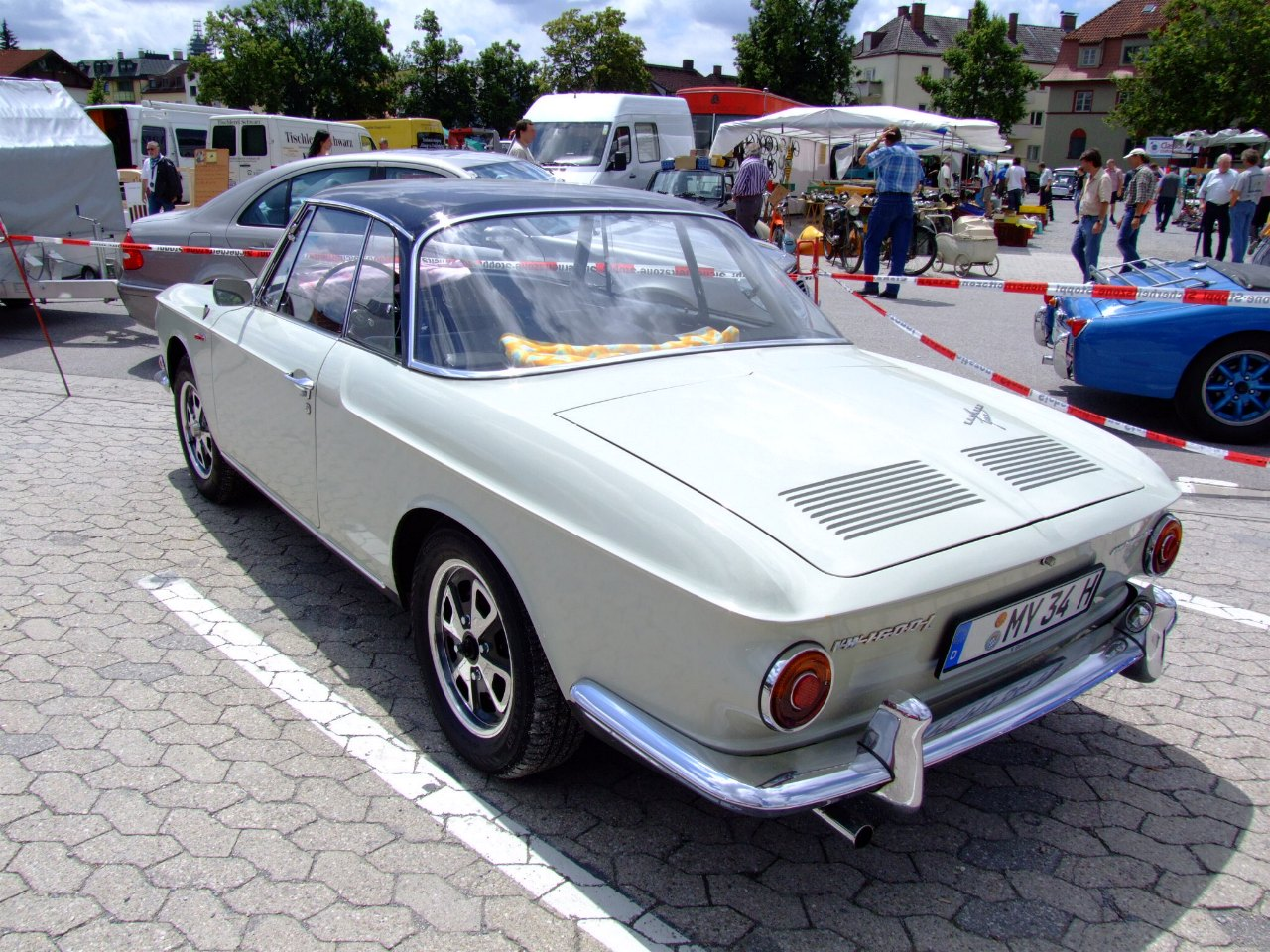 Quelle: selbst fotografiert, 07/2006 Fotograf: Späth Chr.